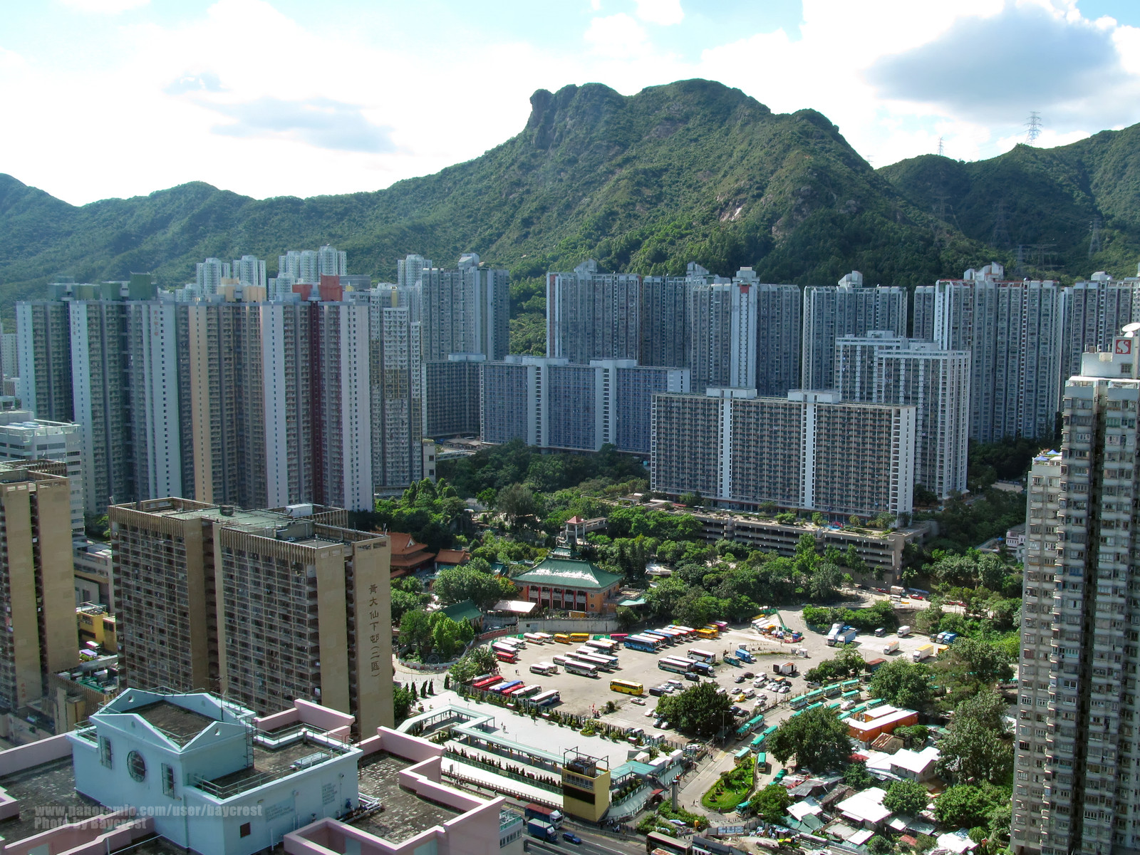 黃大仙